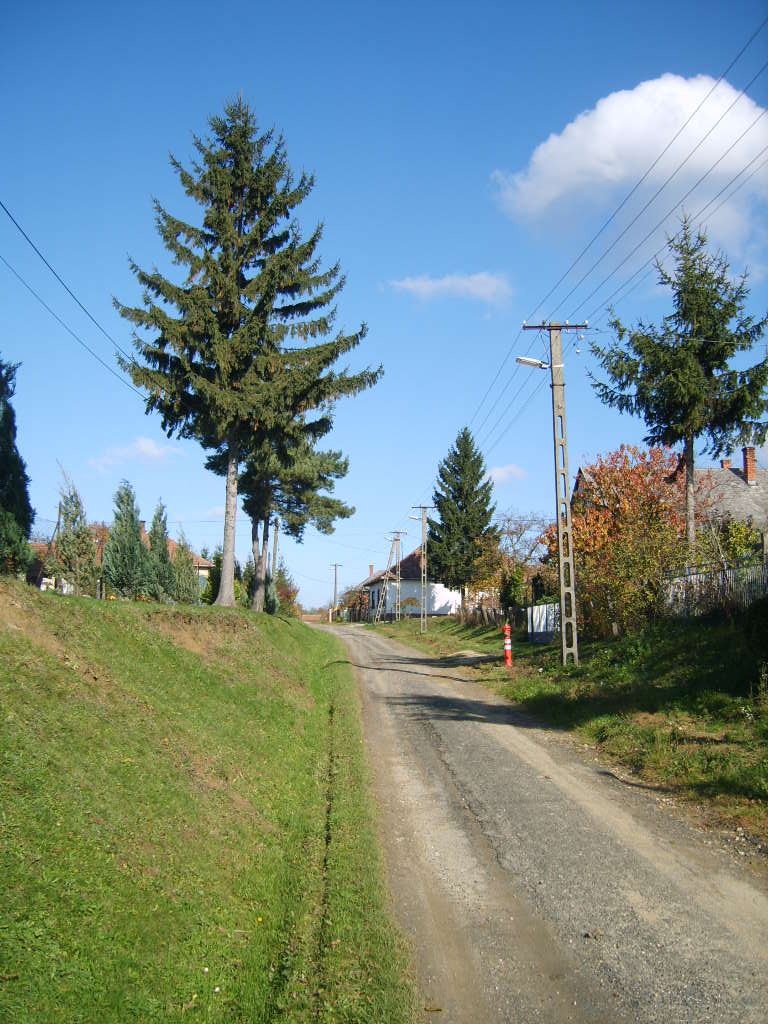 Németfalusi utcakép